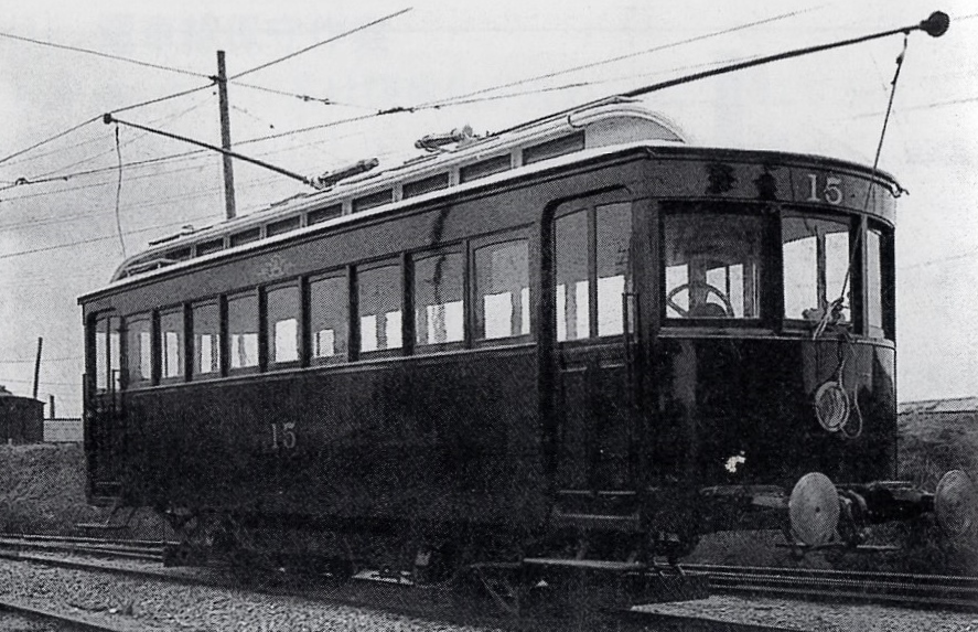 愛知電気鉄道 電2形キャプションには「美麗快速乗心地よき愛知電車（愛知電鉄写真部）」とある